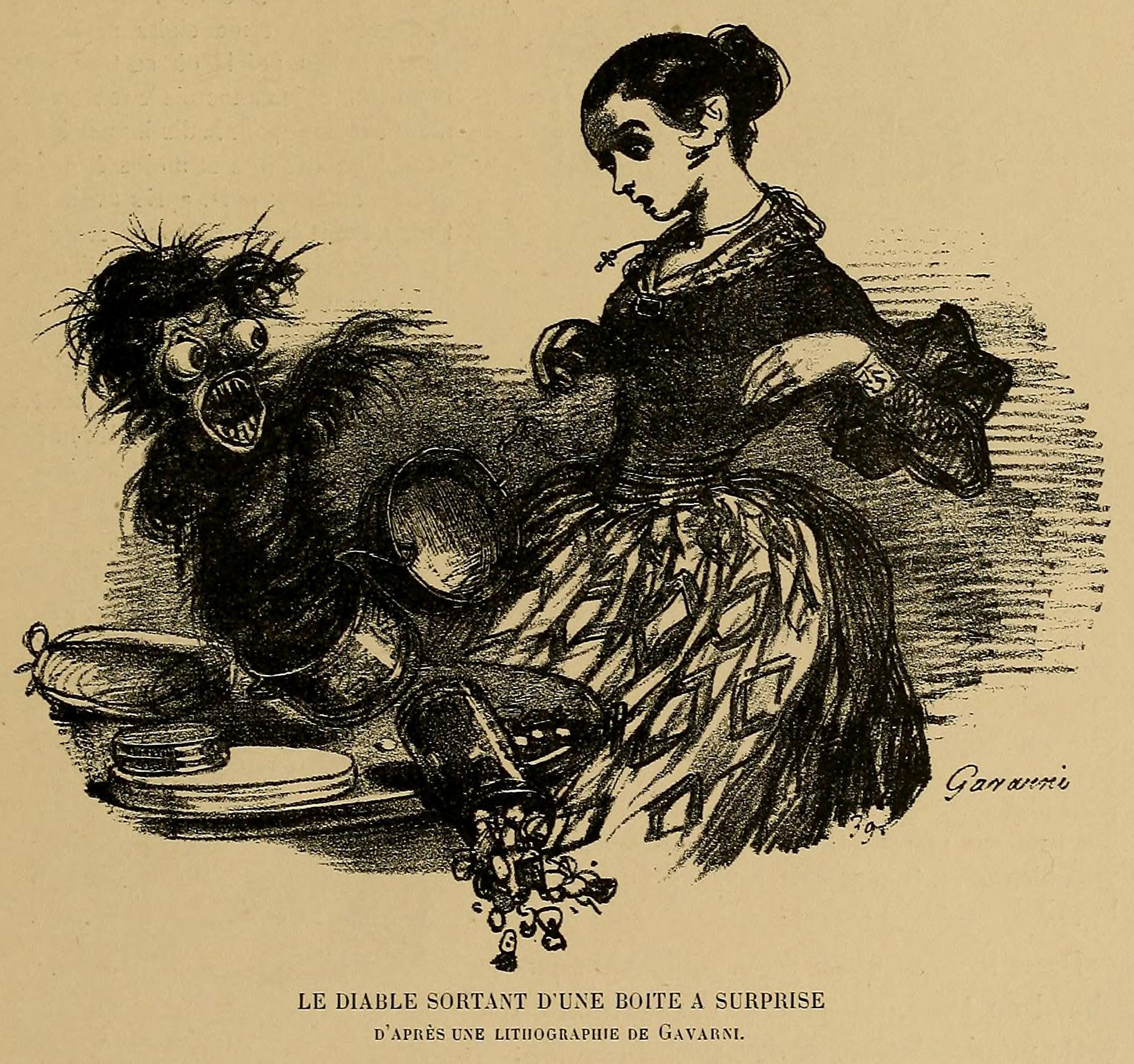 Illustration from Histoire des jouets